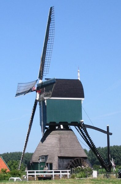 Wipmolen met open scheprad (Boterslootse molen Noordeloos)(Foto: Hans de Kroon)